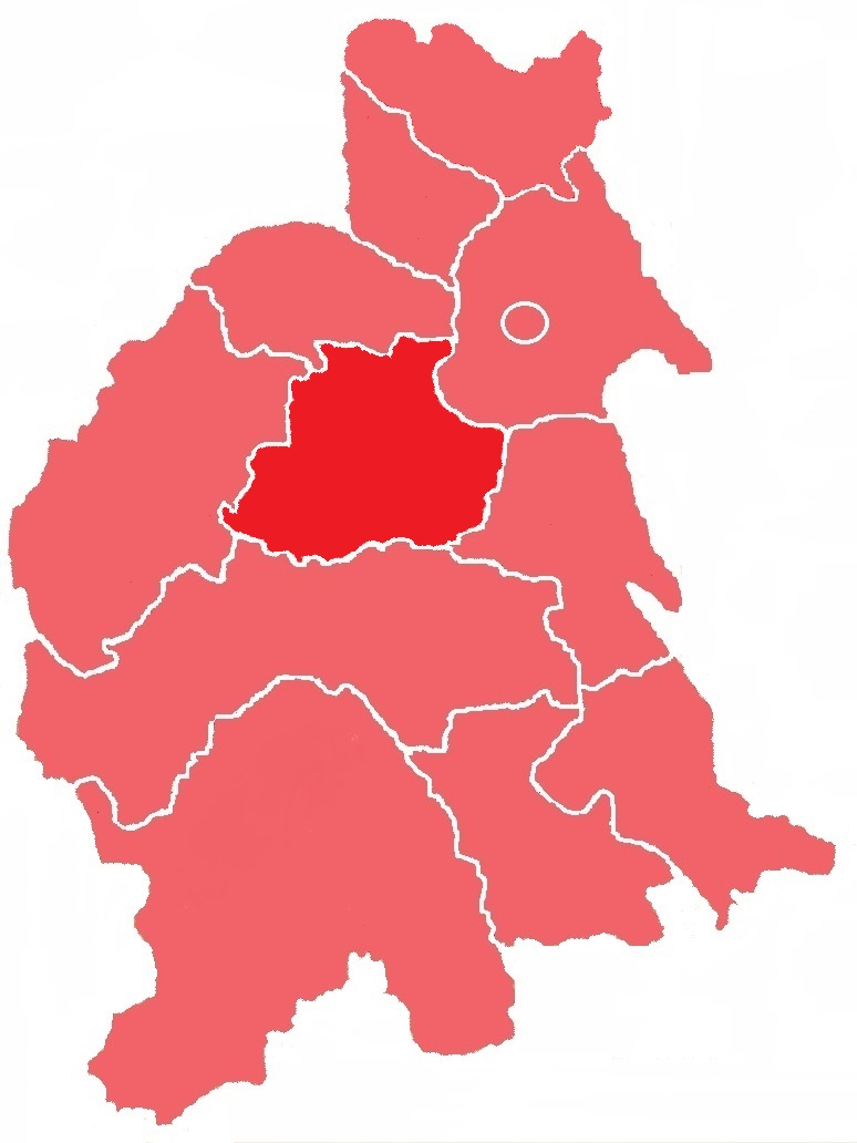 Сторожинецький повіт